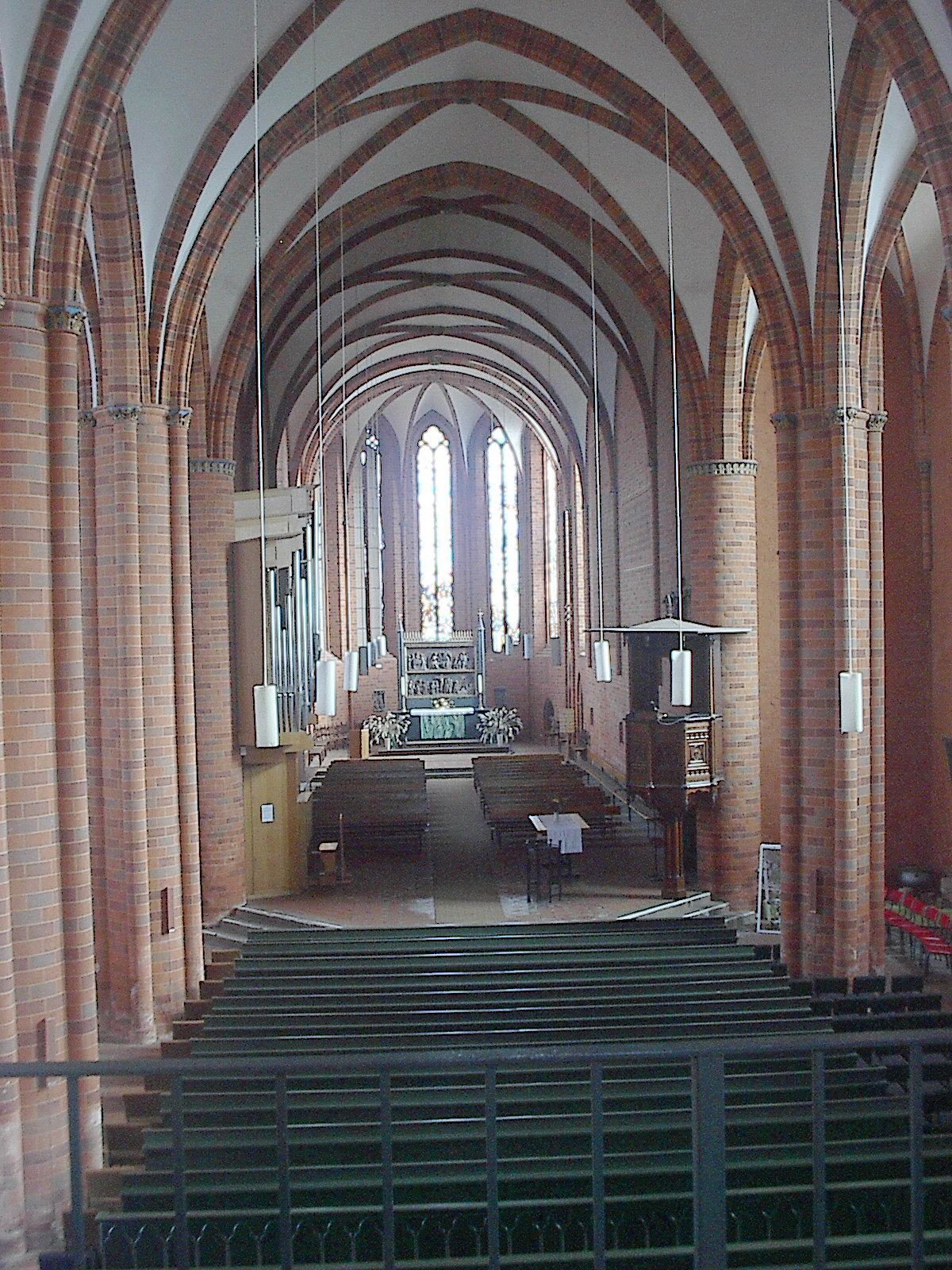 Chorraum der Klosterkirche Sankt Trinitatis in Neuruppin